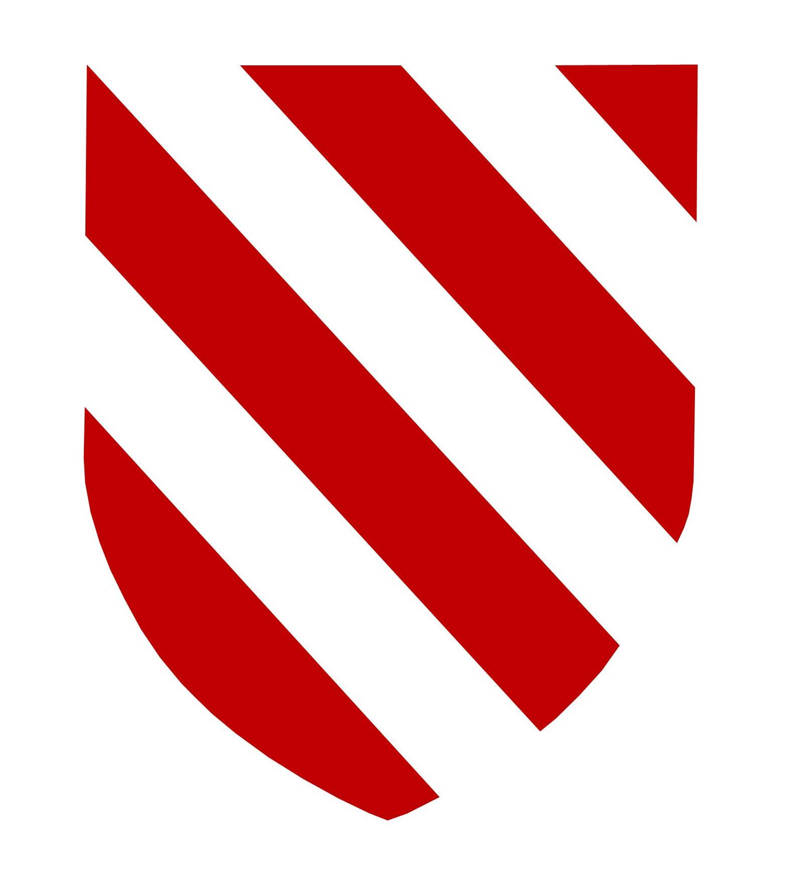 Escut del Castell d'Alta-riba i del llintage del mateix nom descendent d'aquesta fortalesa.